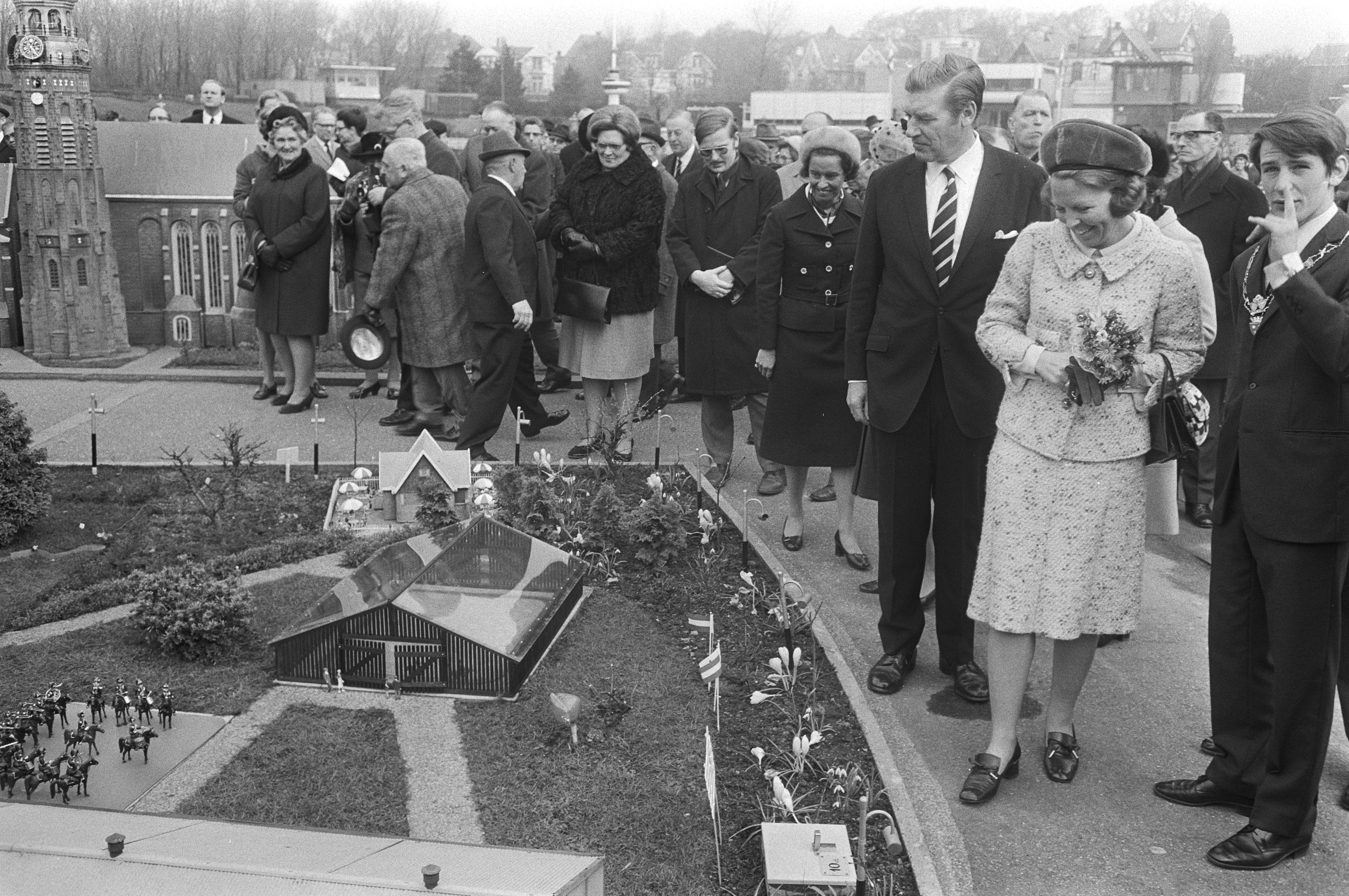 Collectie / Archief : Fotocollectie Anefo Reportage / Serie : Prinses Beatrix aanwezig bij de opening van Madurodam in Den Haag Beschrijving : Prinses Beatrix tijdens een rondwandeling door Madurodam Annotatie : Prinses Beatrix was van 1952 tot 1980 'burgemeester' van Madurodam Datum : 3 maart 1971 Locatie : Den Haag, Zuid-Holland Trefwoorden : miniaturen, openingen Persoonsnaam : Beatrix, prinses Fotograaf : Fotograaf Onbekend / Anefo Auteursrechthebbende : Nationaal Archief Materiaalsoort : Negatief (zwart/wit) Nummer archiefinventaris : bekijk toegang 2.24.01.05 Bestanddeelnummer : 924-4097